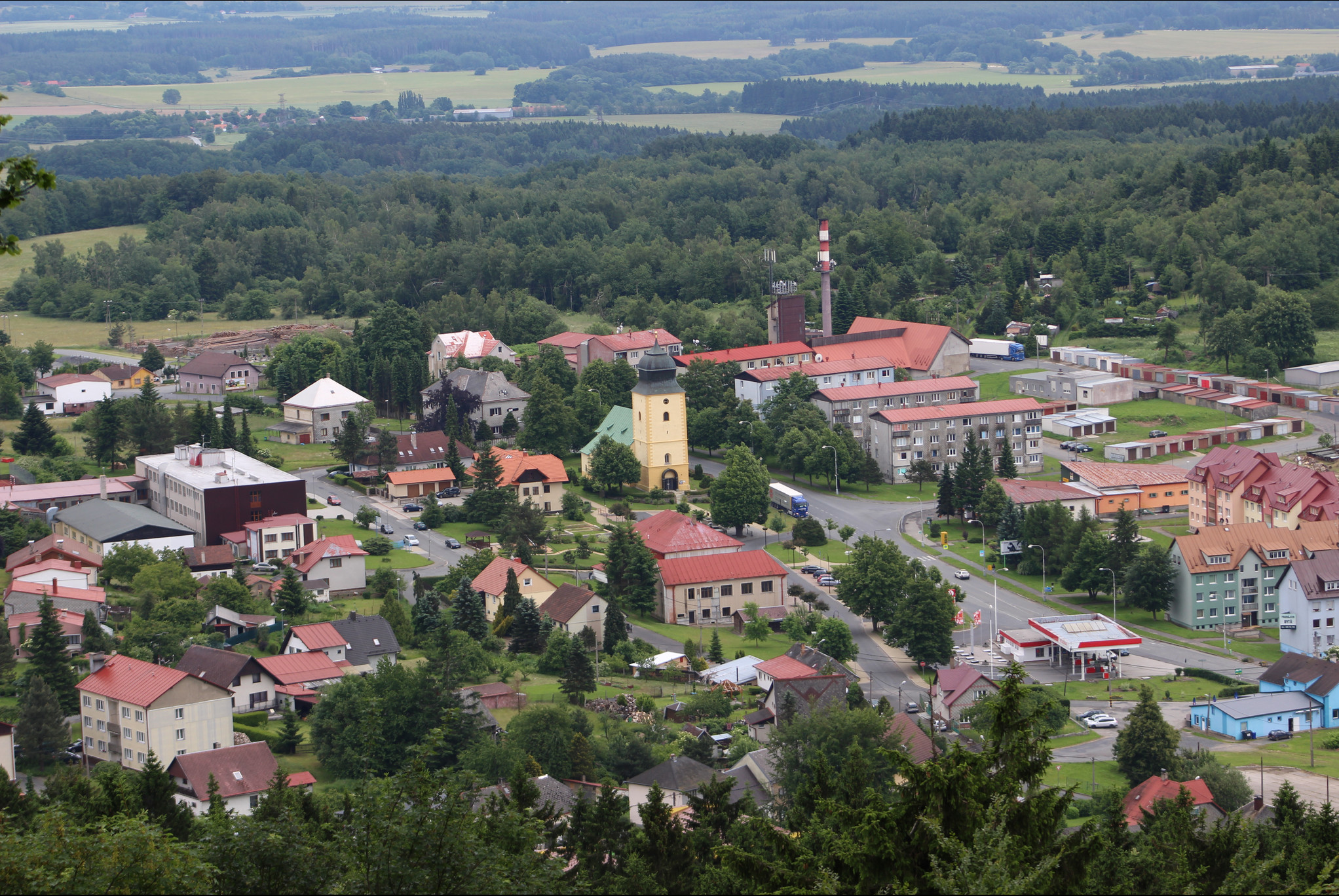 obec Přimda, okres Tachov, Plzeňský kraj, pohled od zříceniny hradu Přimda